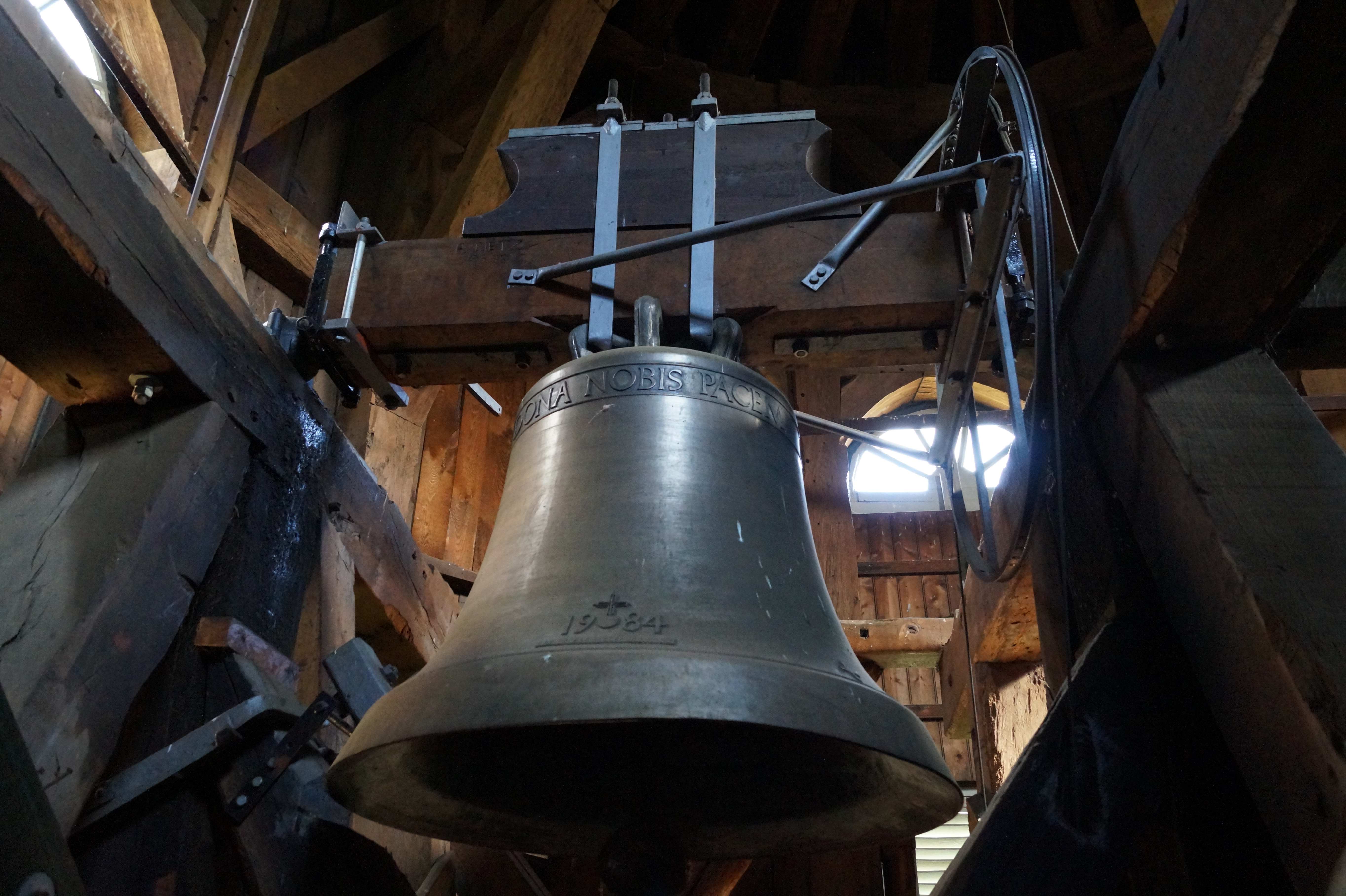 Glocke der Michaeliskirche